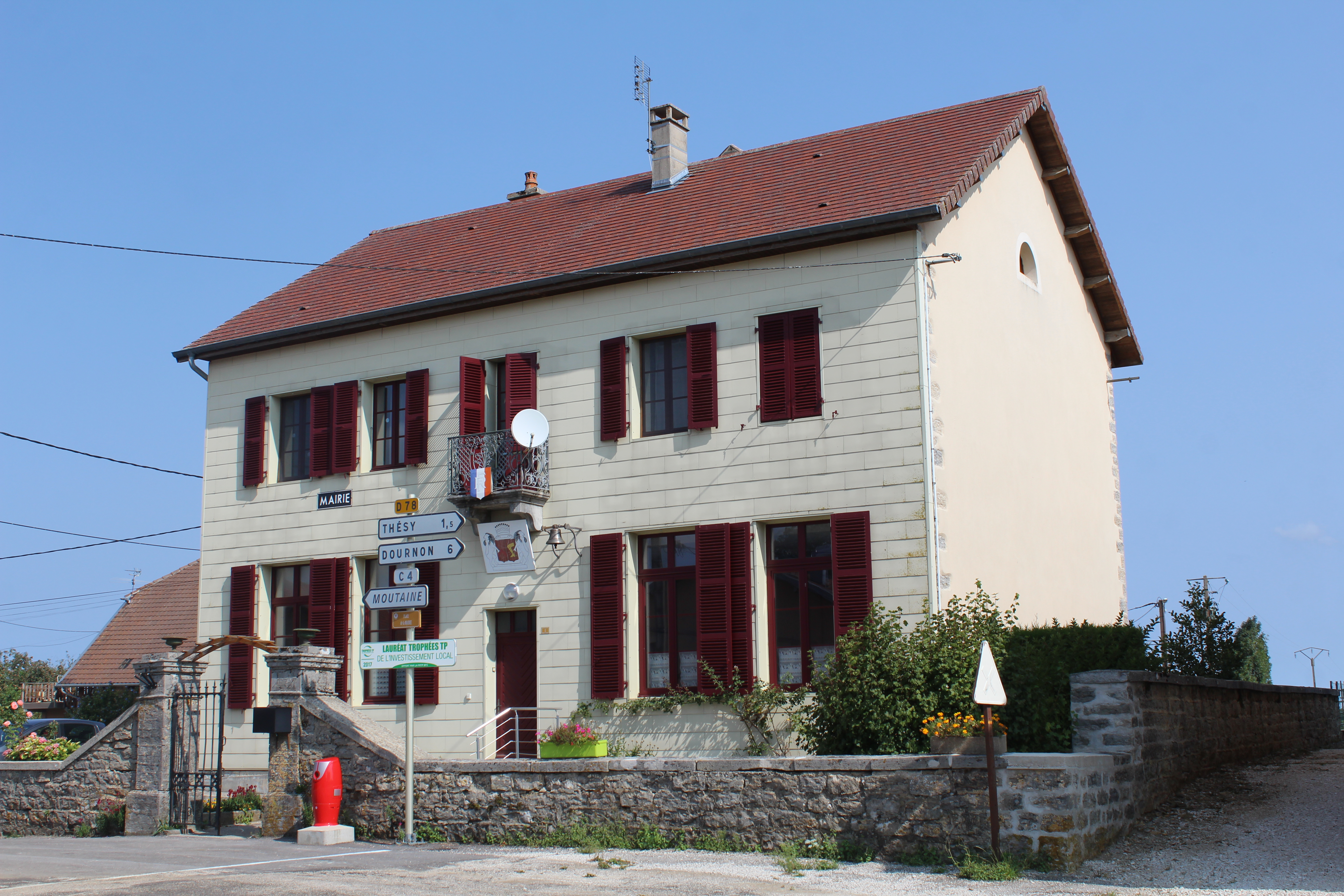 Mairie d'Aresches.